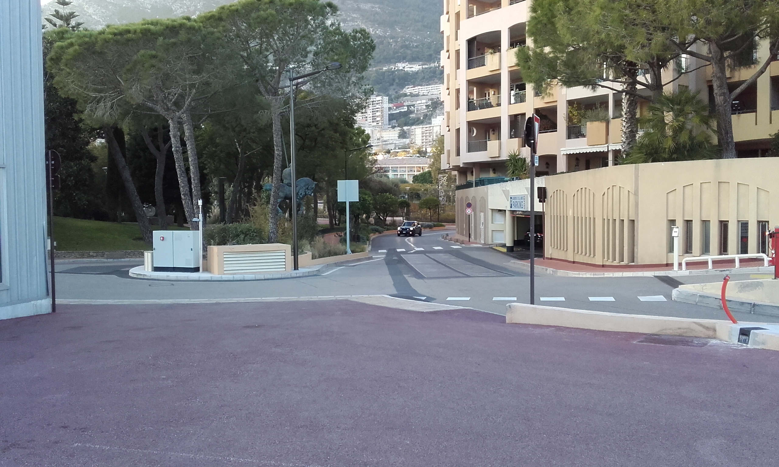 Gouvernement princier, Principauté de Monaco. La route l'énergie de demain, dite route solaire Réalisateur wattway - Colas. Puissance électrique instantanée : 45 W Production journalière : 3.44 KWh Production cumulée depuis la mise en service : 37,5 KW Équivalent en heures d'éclairage de la Roseraie Princesse Grâce : 1.12 h